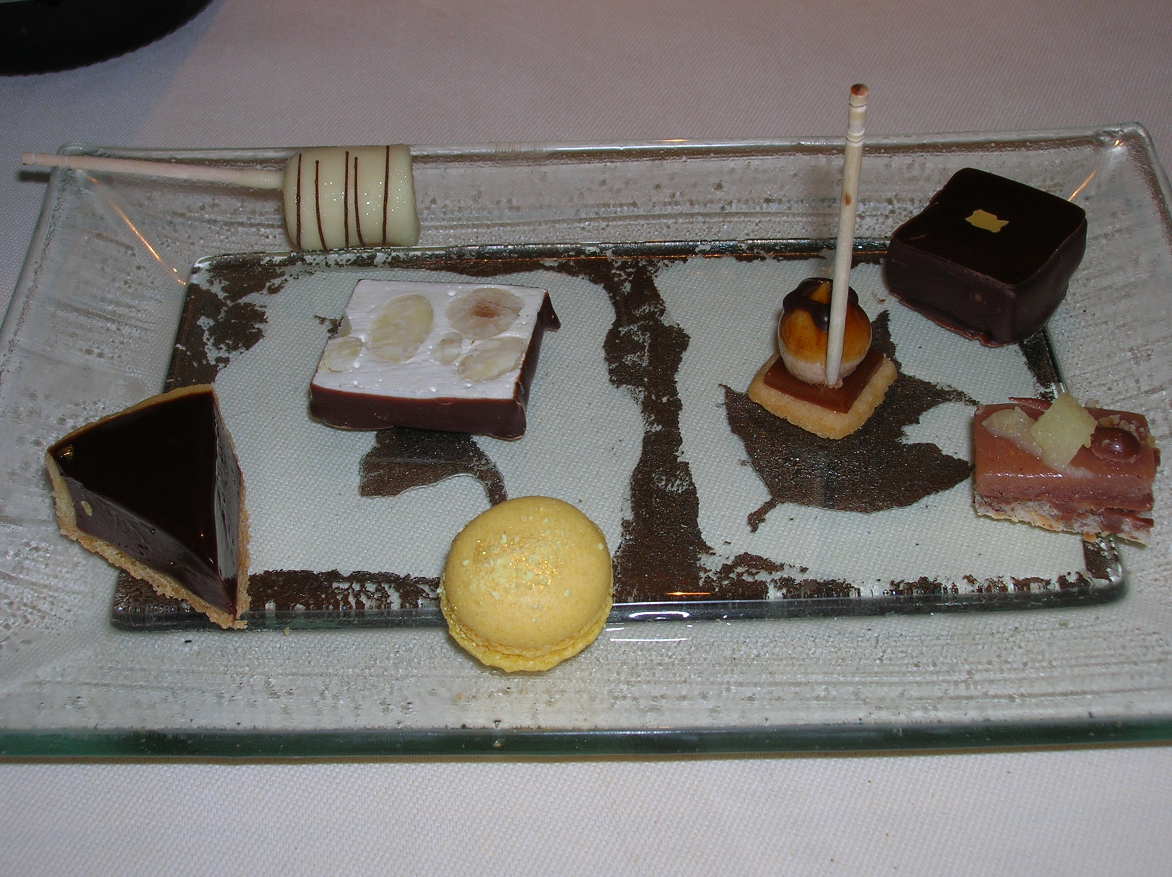 מסעדת לה מנואר או קואט סזון